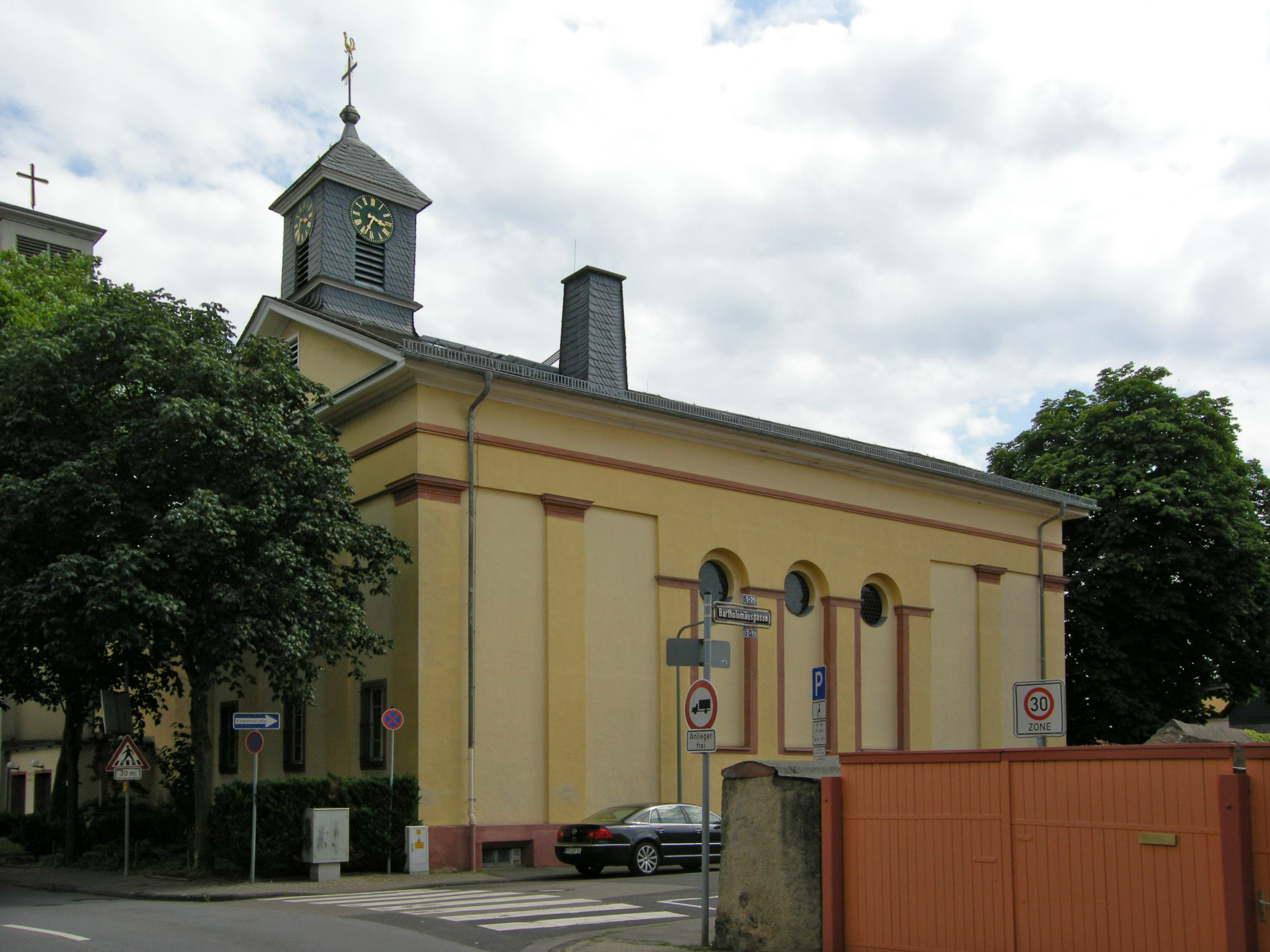 St. Bartholomäus Zeilsheim Christian Zais 1817-1818